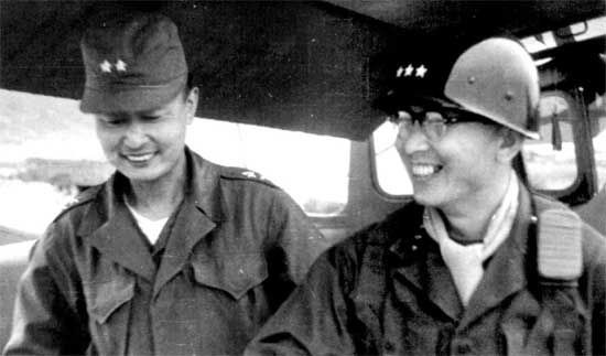 Paik Seon-yup and Chung Il-gwon 1951.06.12